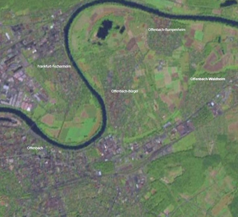 Satelittenaufnahme des Mainbogens